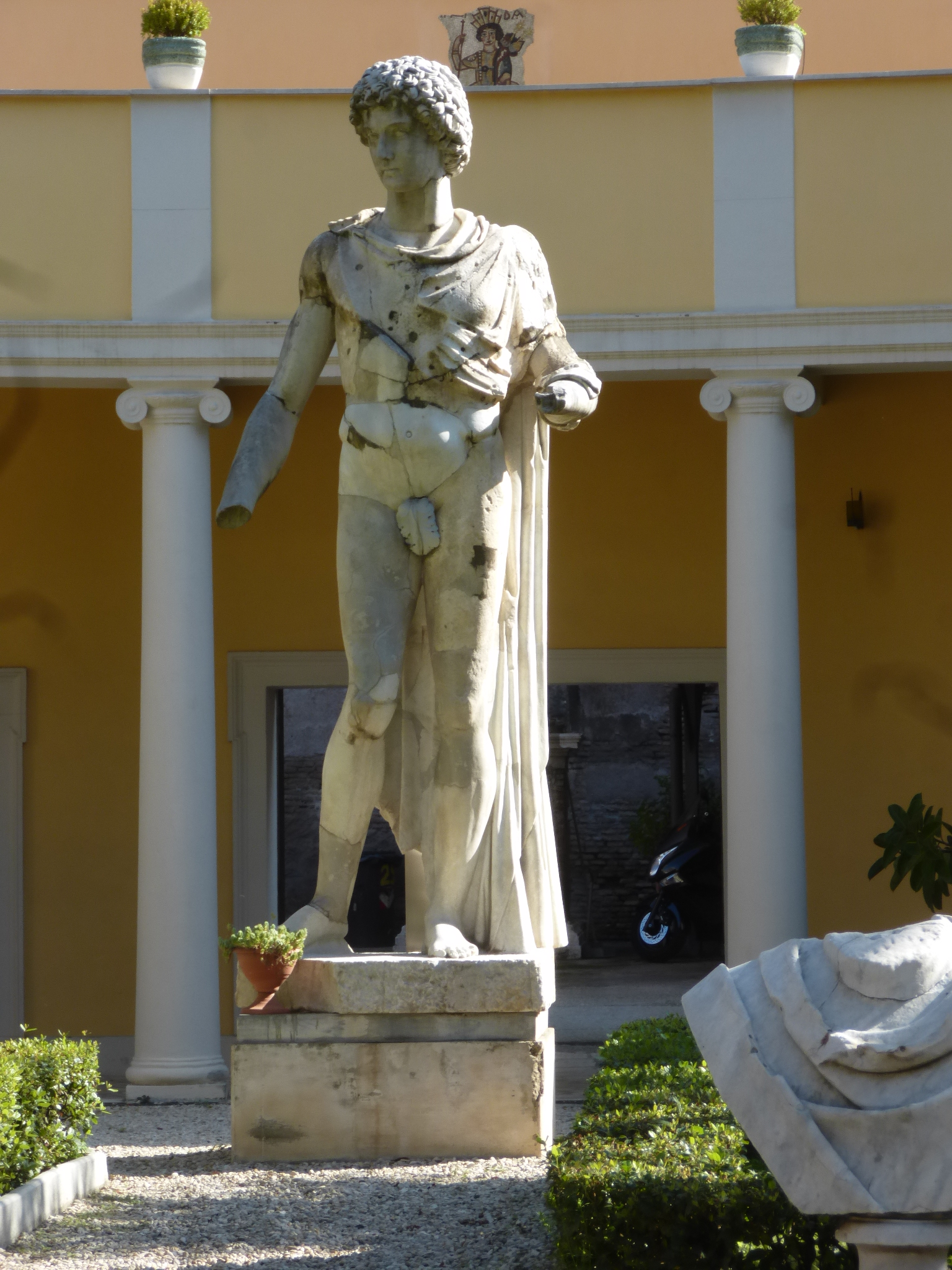 Roma, Casino Giustiniani Massimo, pastiche scultoreo c.d. Giustiniano